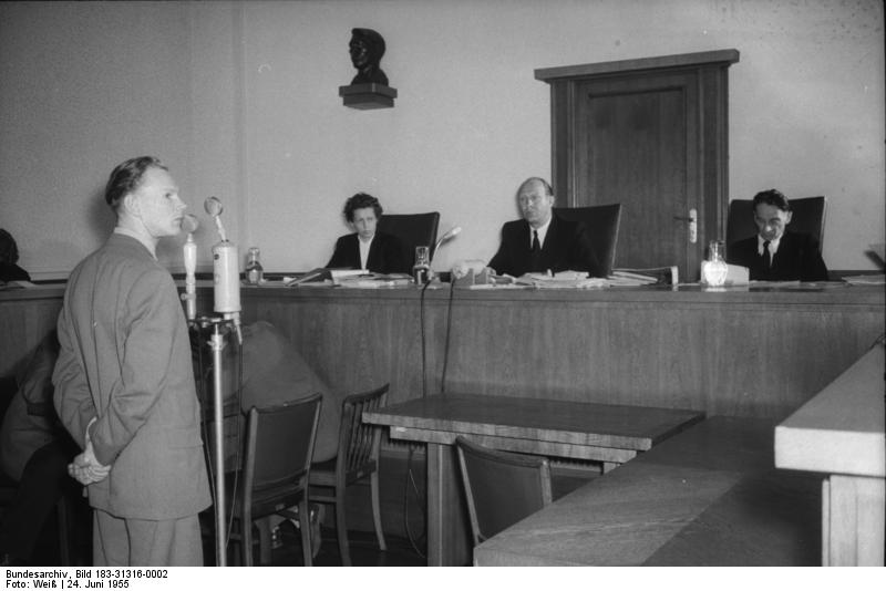 Zentralbild/Weiß 24.6.1955 Prozeß gegen Agenten vor dem Obersten Gericht Am 24.6.1955 begann vor dem Obersten Gericht der Deutschen Demokratischen Republik in Berlin ein Prozeß gegen fünf Angeklagte, die vom RIAS zur Agententätigkeit für Spionageorganisationen angeworben wurden. UBz Der Angeklagte Joachim Wiebach. Er war Dekorateur bei der DEWAG In der Bildmitte Kurt Schumann, der Präsident des Obersten Gerichts. Links und rechts von ihm sehr wahrscheinlich die Beisitzer Helene Kleine und Hans Rothschild.